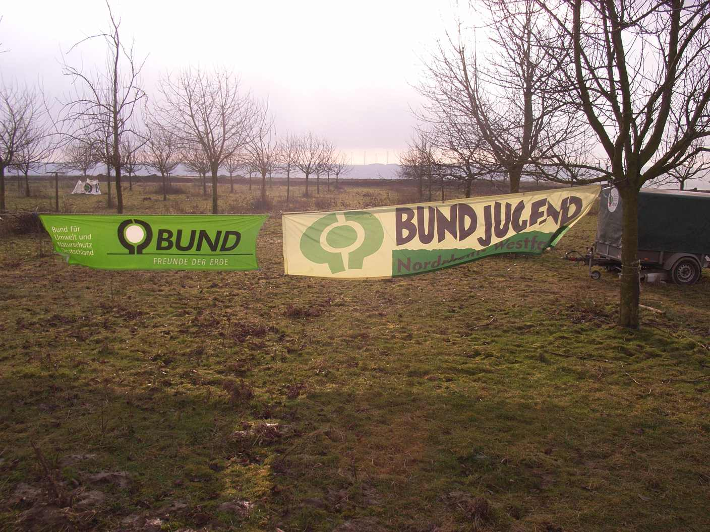 Zeltlager des BUND auf einer Obstwiese bei Otzenrath am Rand des Tagebaus Garzweiler, NRW